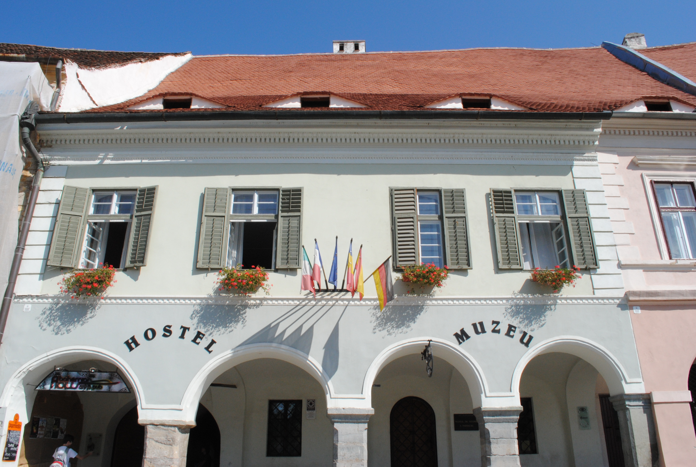 Casă și farmacia " La Ursul Negru", azi locuințe și Muzeul de Istoria Farmaciei, sec. XV - XVI, sec. XVIII